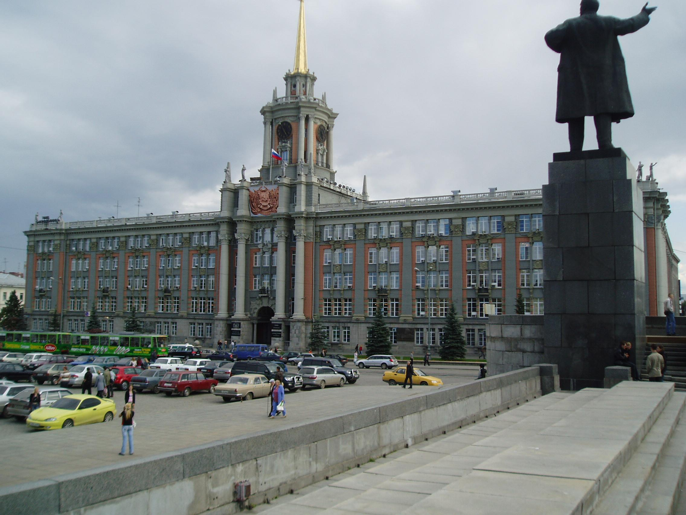 Stadsdoemagebouw van Jekaterinenburg aan de Plosjtsjad 1905 goda. Het doemagebouw vormde vroeger een Gostiny Dvor. Het standbeeld van Lenin op de voorgrond staat op de plek waar zich vroeger een standbeeld van tsaar Alexander II bevond. Own photo. Created in summer 2006.